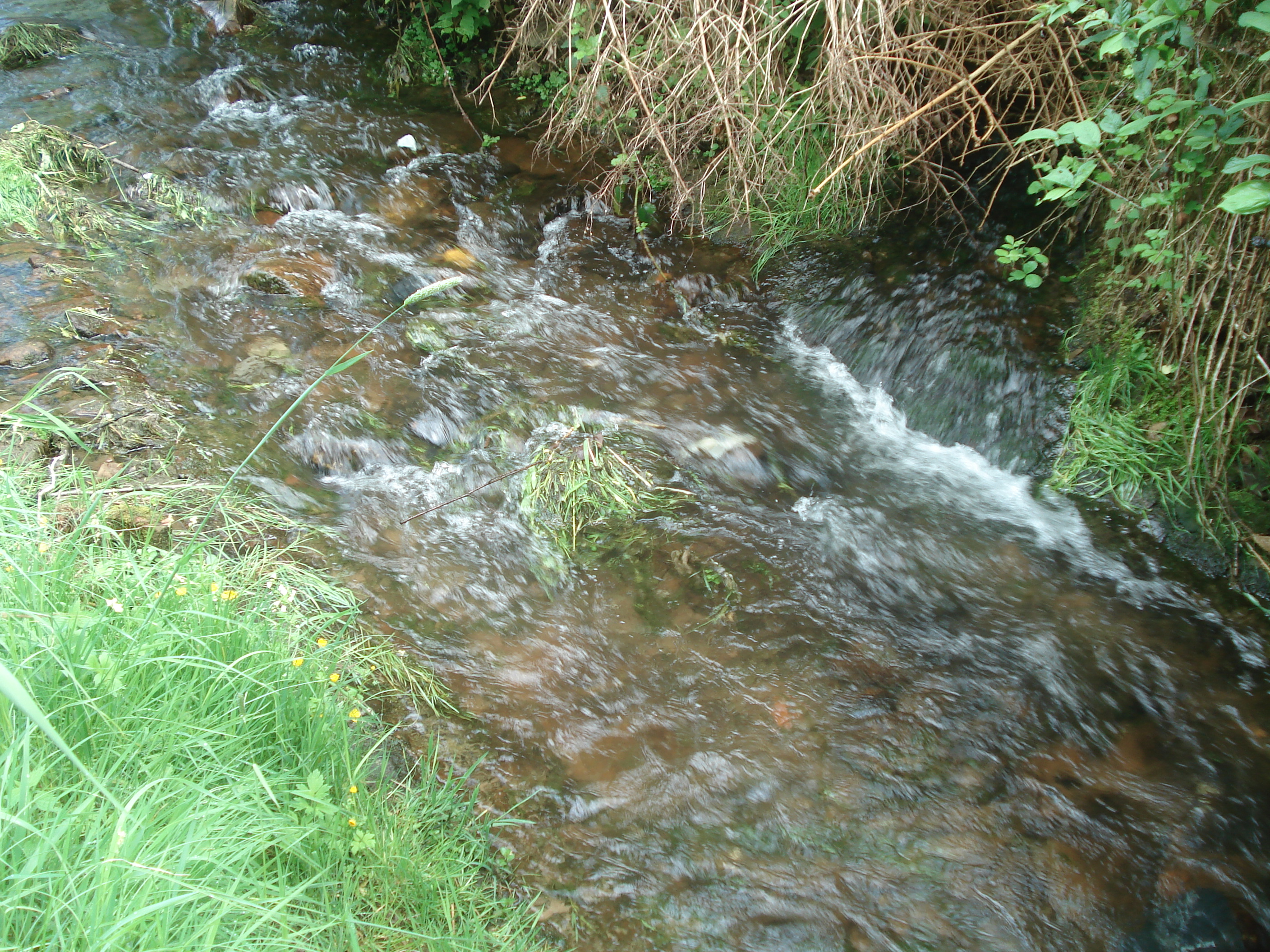 Der Krebsbach (rechts) mündet in die Elsava (von hinten links nach vorne rechts)